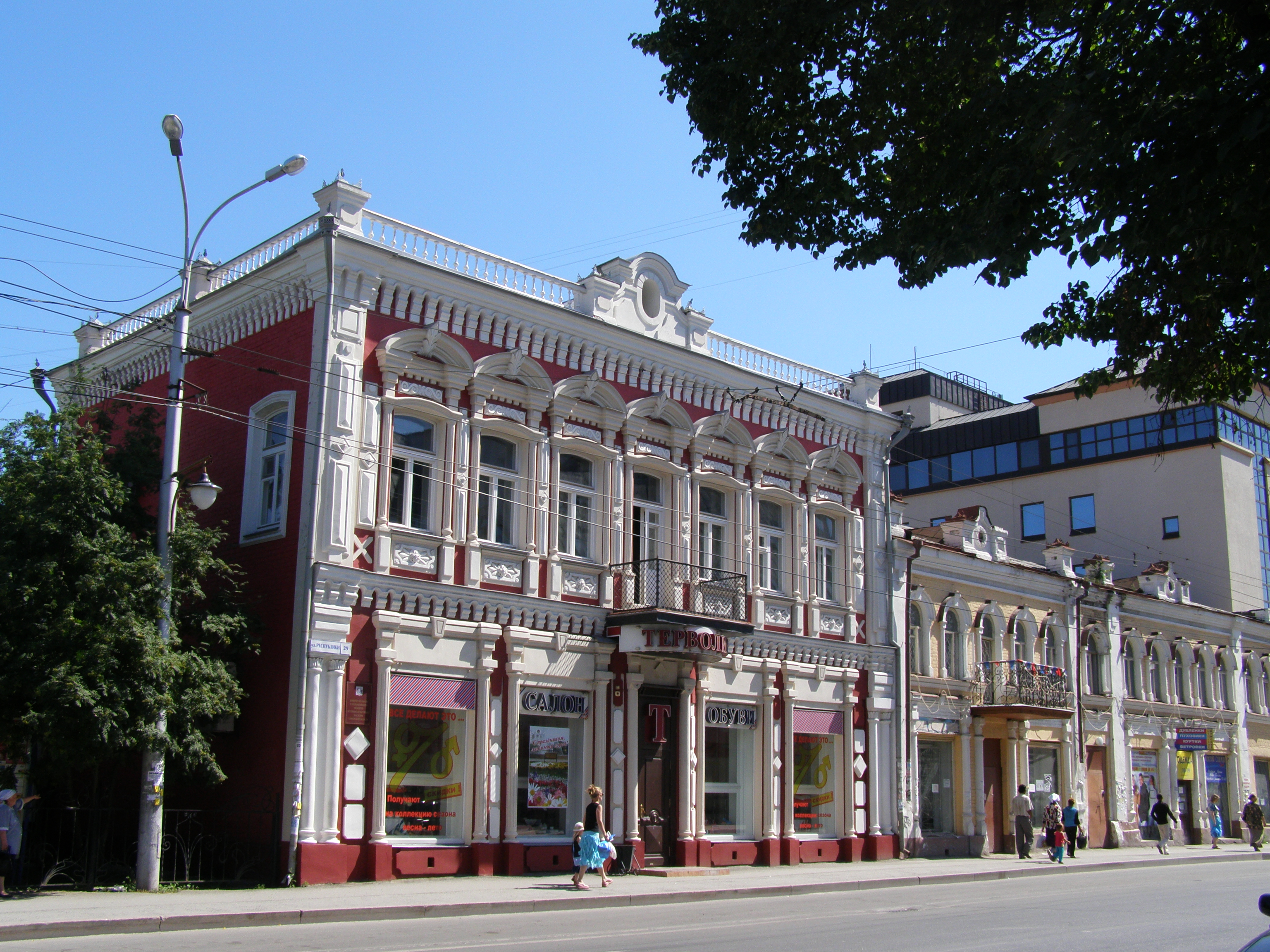 Domoj ĉe strato Respubliki 29 kaj 31. Tjumeno, Rusio.